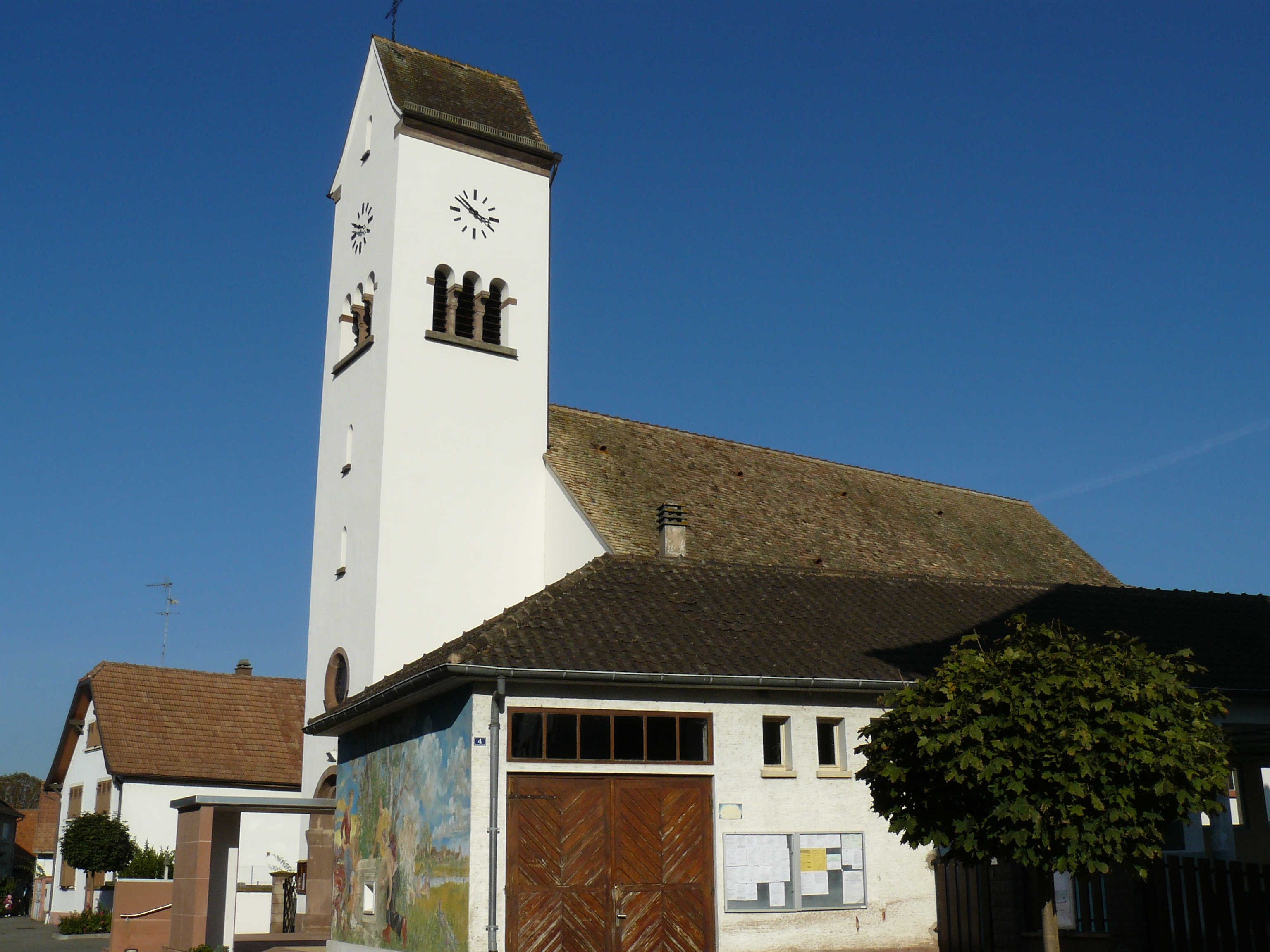 Église catholique Saint-Boniface de Diebolsheim